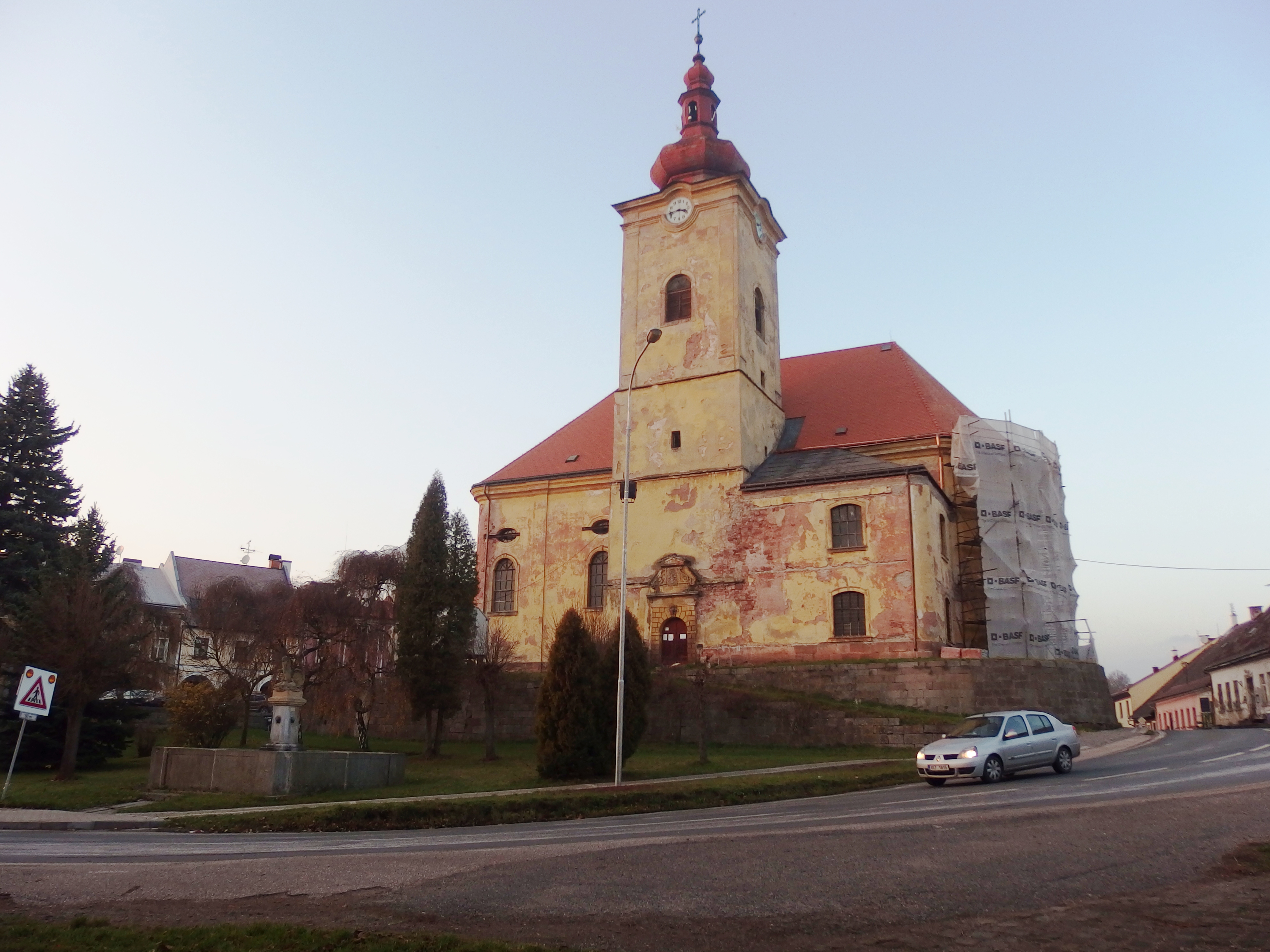 Kostel Nejsvětější Trojice (Pilníkov), Pilníkov.